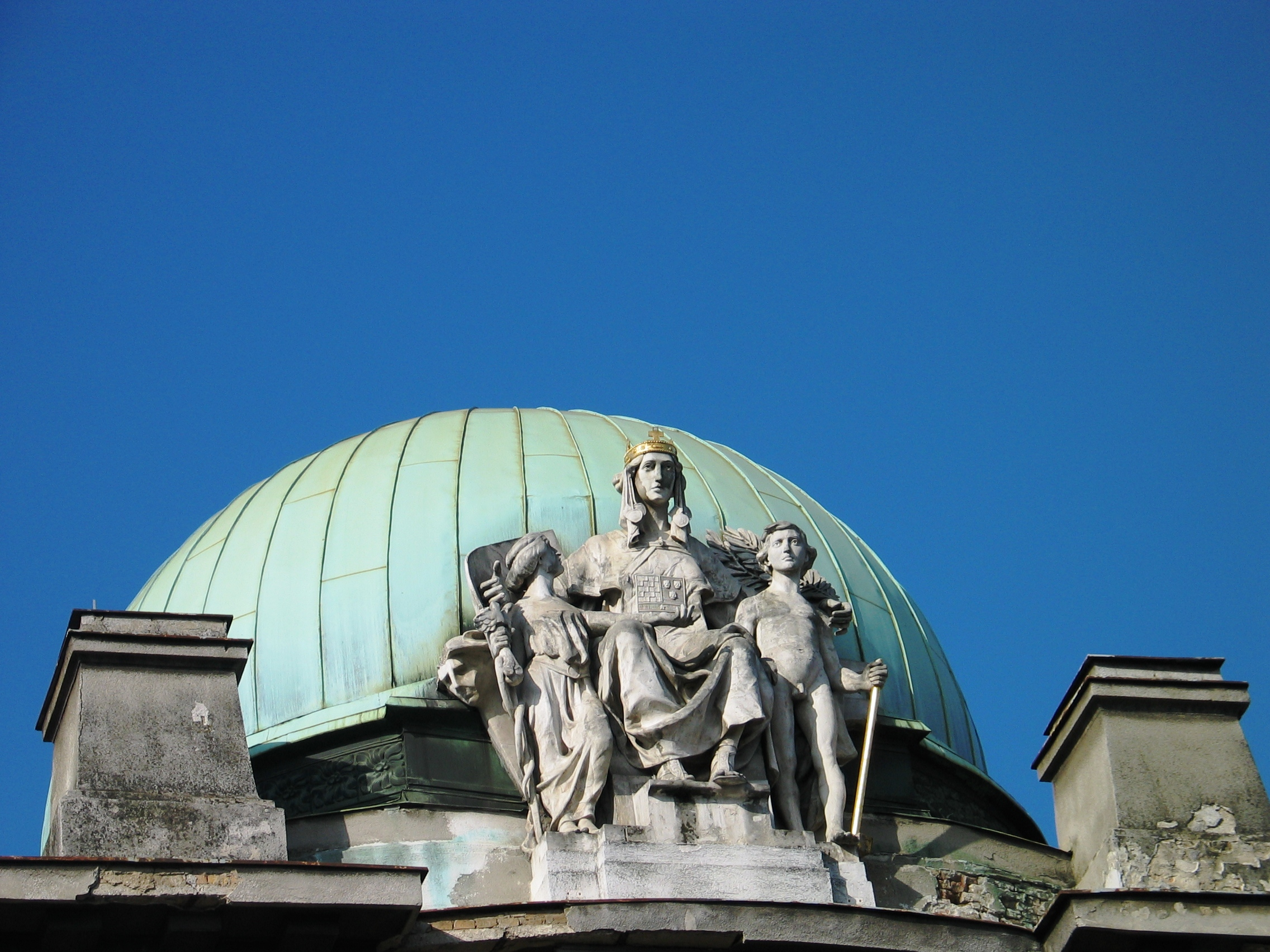 Vjekoslav Bastl- Trgovačko obrtni muzej (Etnografski muzej) Mažuranićev trg 14, Zagreb (1902-3.)